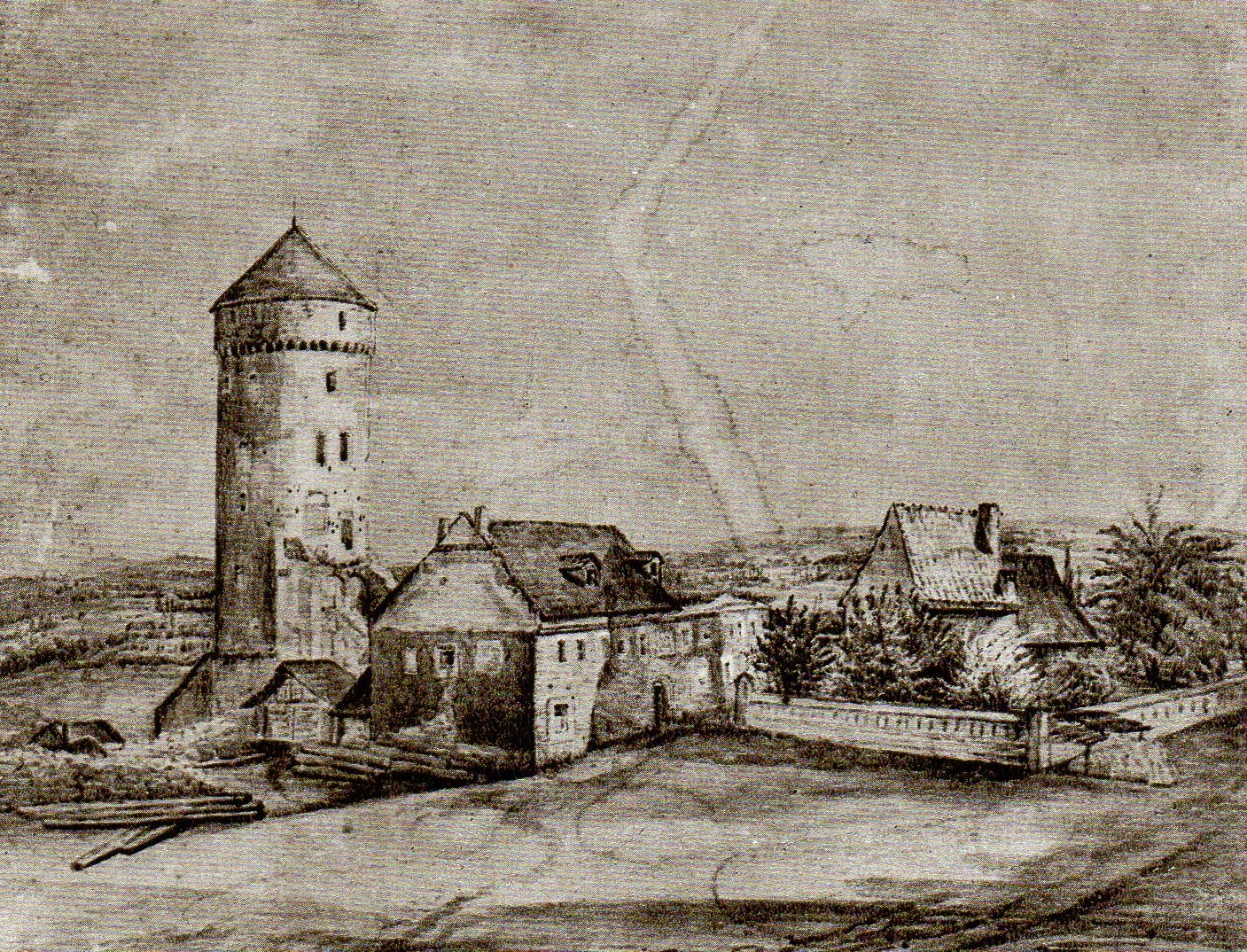 Zach. czesc wzgorza wawelskiego